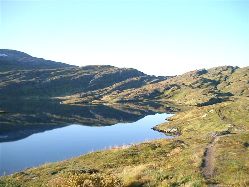 Beschreibung: Vikafjell, Norwegen im September 2002 Quelle: Selbst fotografiert Fotograf oder Zeichner: Benutzer:Sjoehest Andere Versionen: Keine. Lizenzstatus